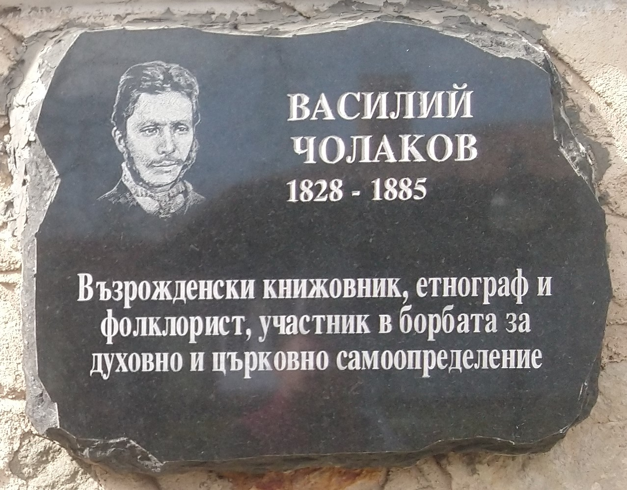 Василий Чолаков (1828 - 1885) - плоча в Исторически музей Панагюрище - Надпис: Възрожденски книжовник, етнограф и фолклорист, участник в борбата за духовно и църковно самоопределение.